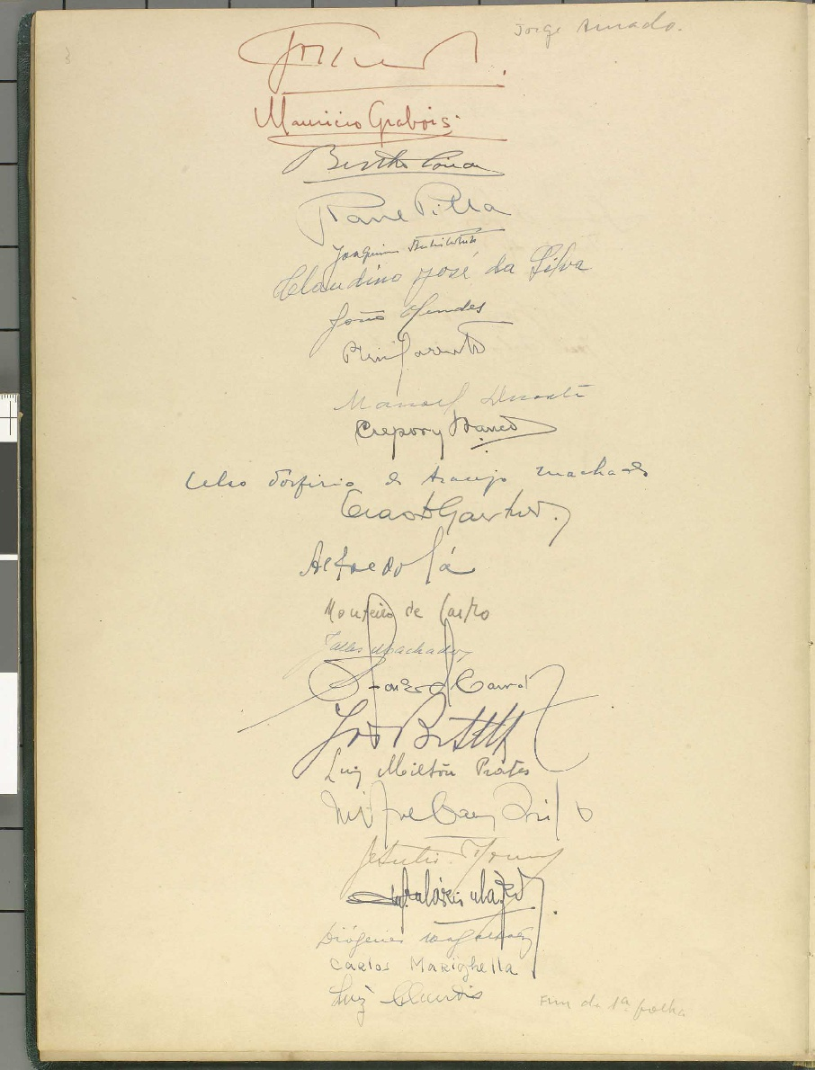 Página 43 da Constituição da República do Brasil, de 1946.